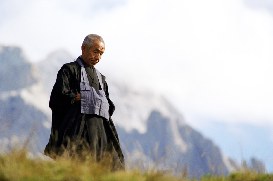 Kobun Chino Otagowa